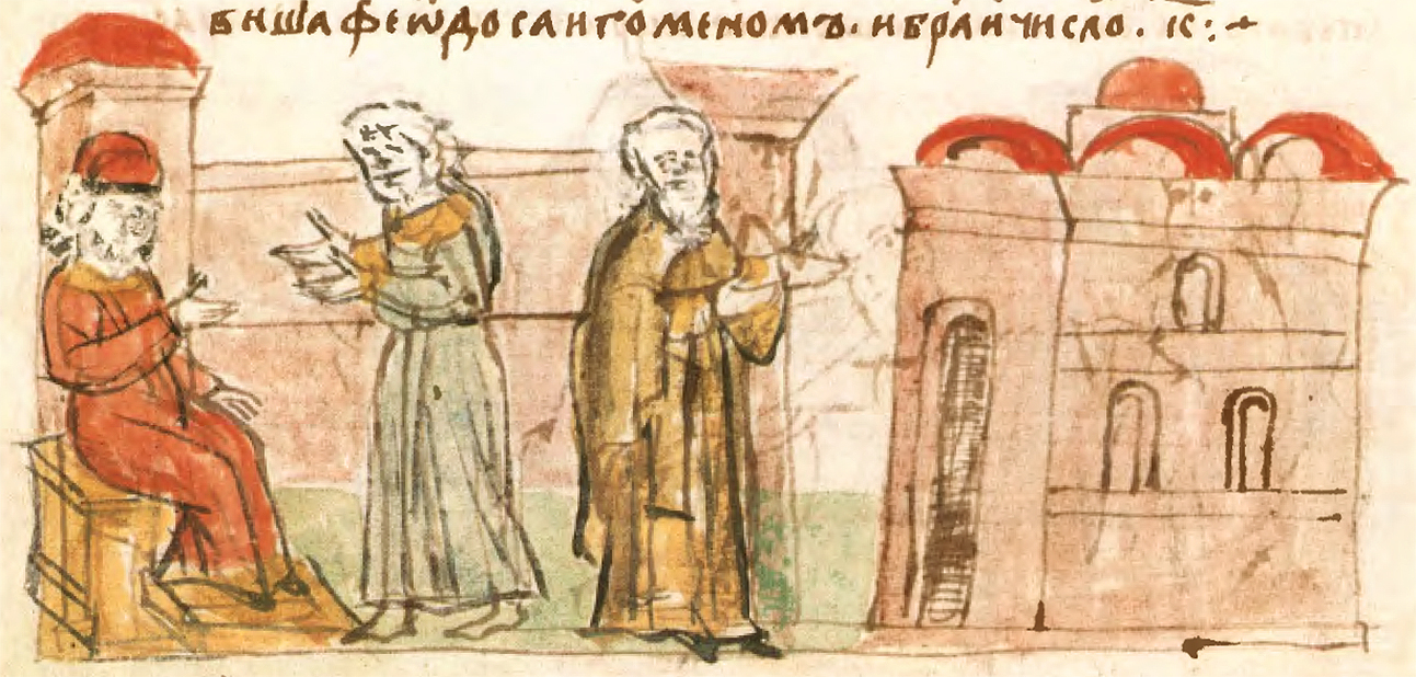 Опис події за 1051 рік в Повісті временних літ: «І коли монастир постав, ігуменство тримав Варлам, Ізяслав збудував монастир святого Димитрія, і вивів Варлама на ігуменство до святого Димитрія, і хотів поставити цей монастир вище Печерського, бо надіявся на [своє] багатство».